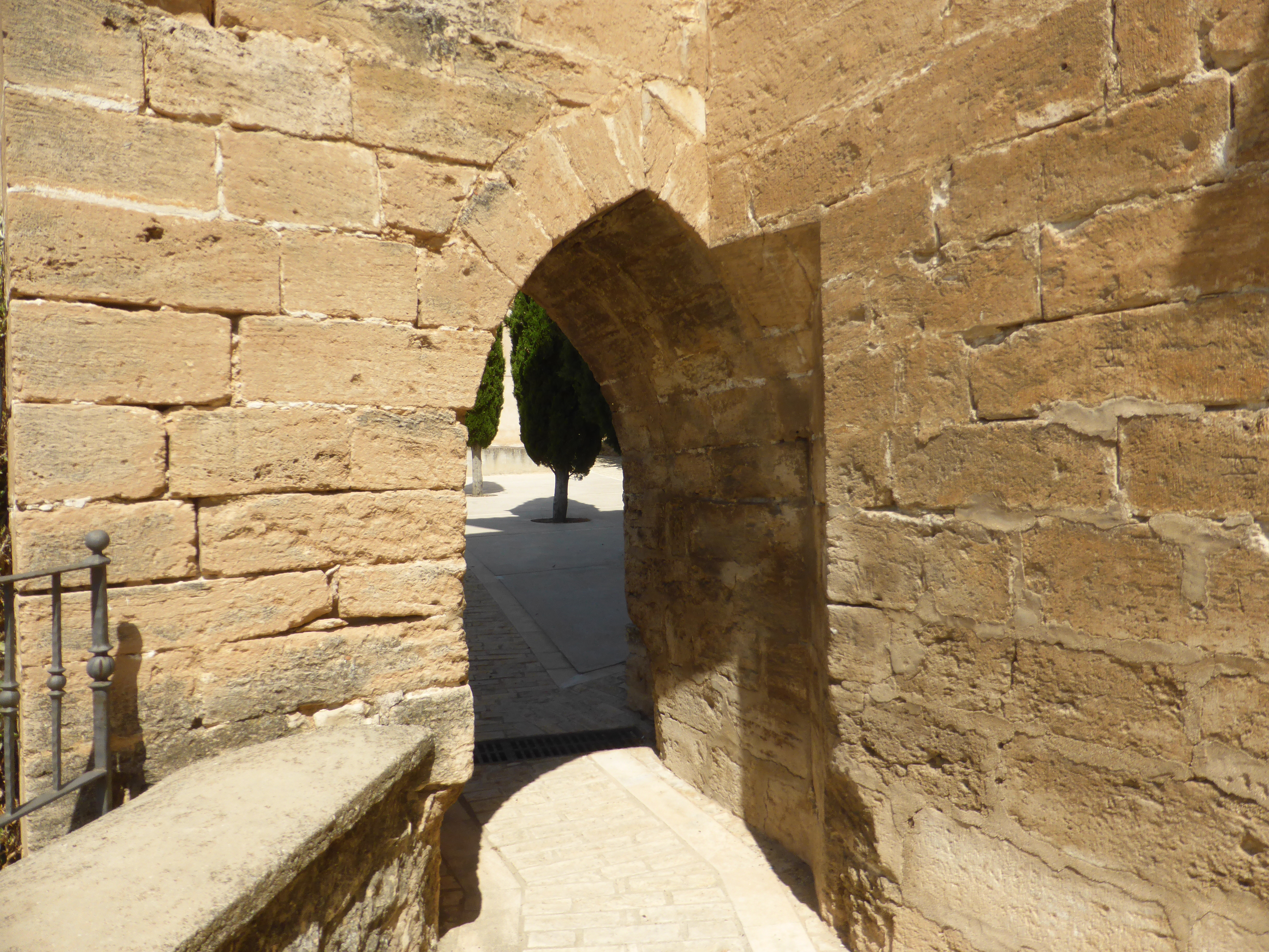 Arco ojival, medieval, para acceder a la "plaza de la Iglesia" (de San Miguel), desde la calle Horno Alto.